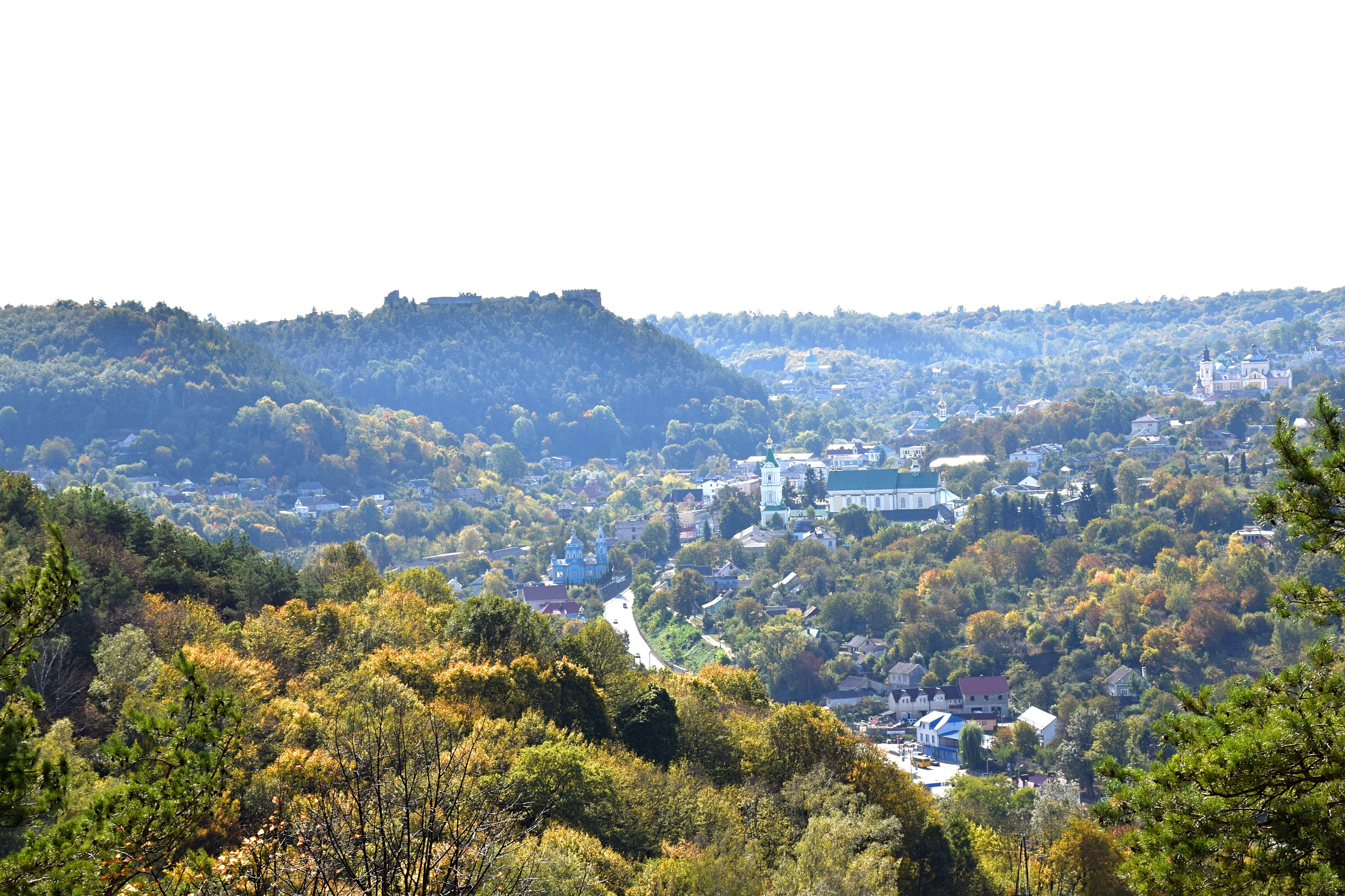 Замкова гора м. Кременець